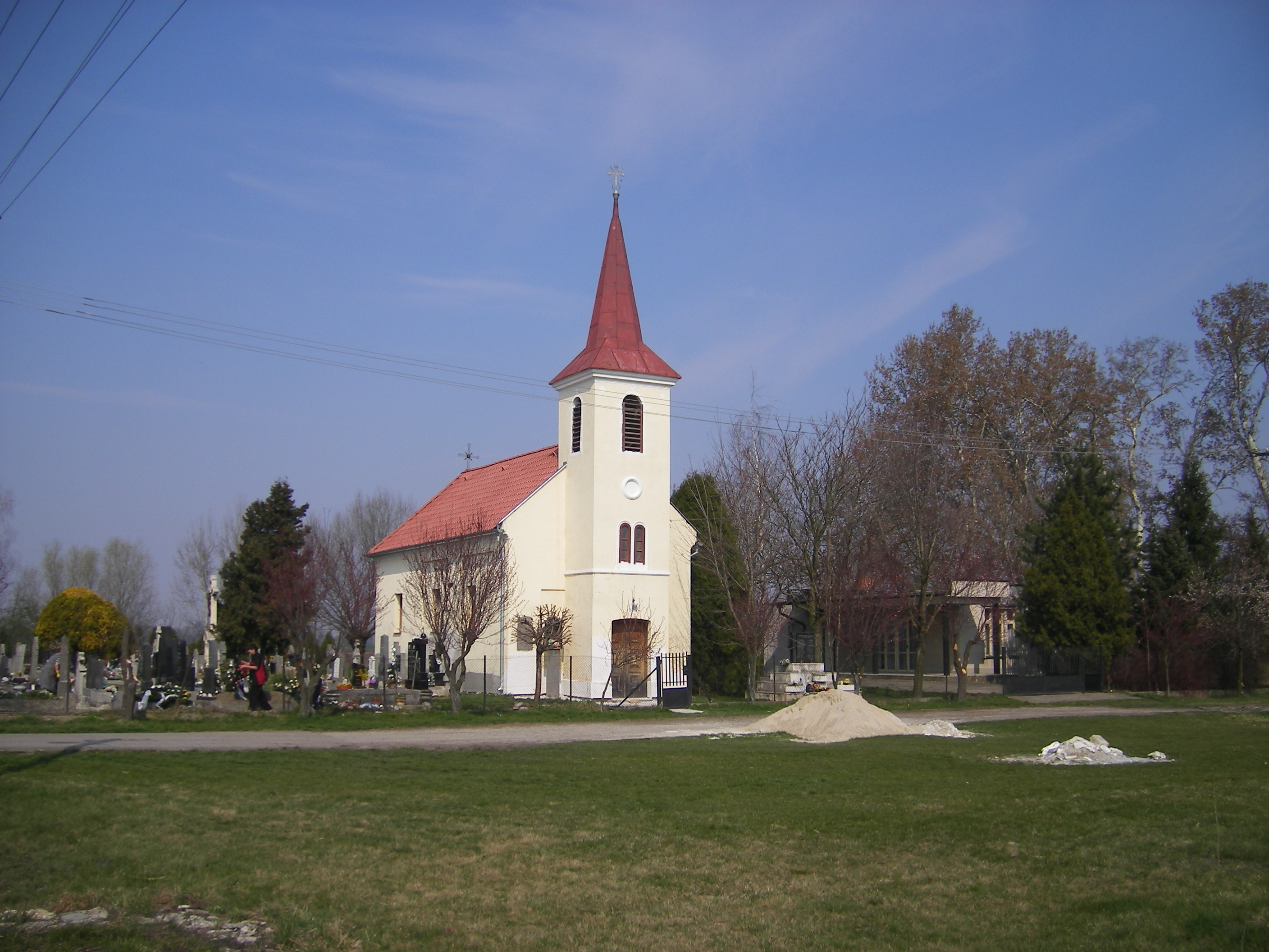 Bogyarét, katolikus templom.